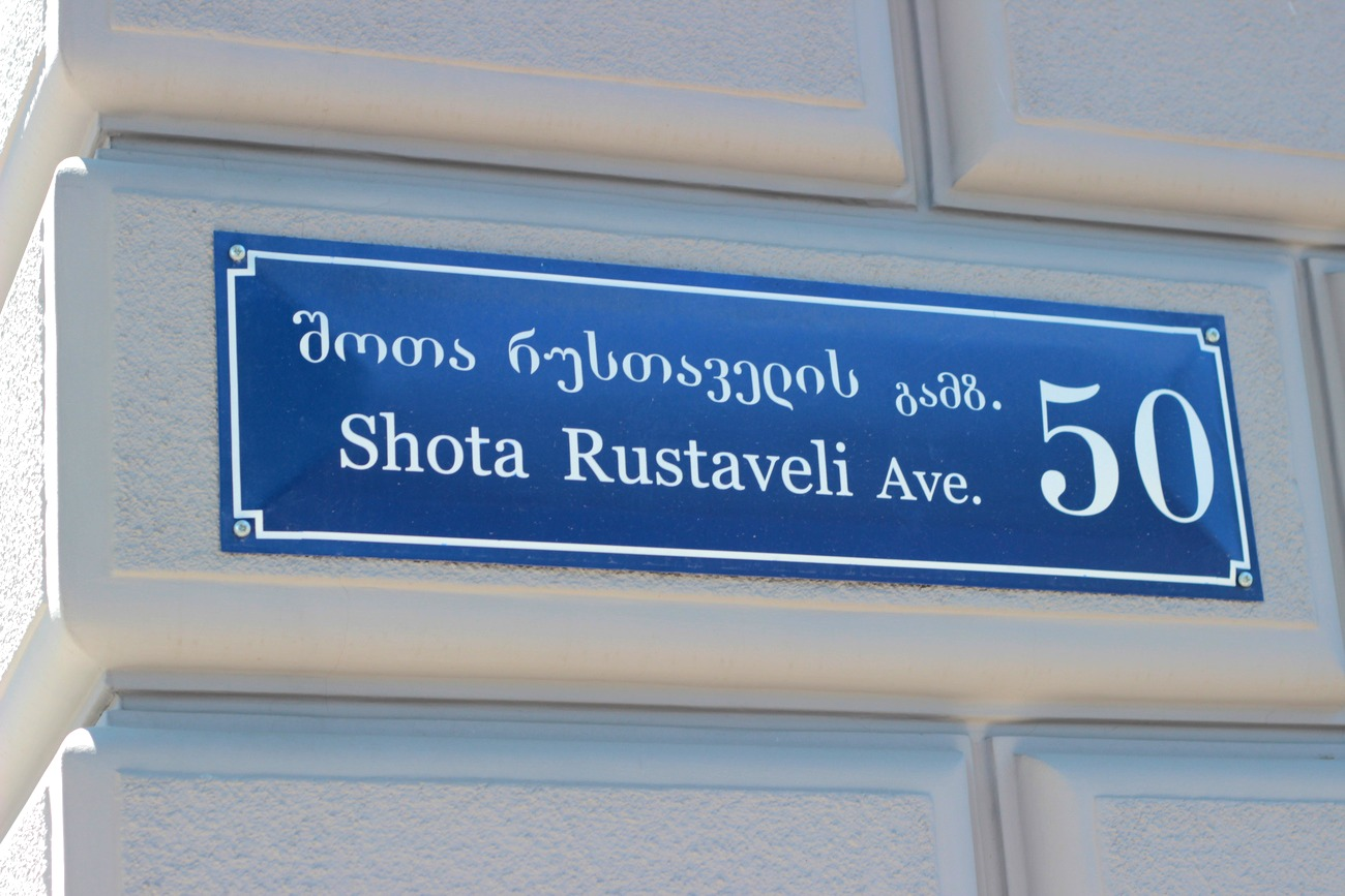 Shota Rustaveli Ave.